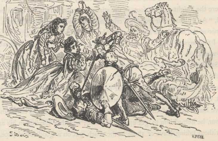 "As Damas pedem a Dom Quixote para poupar a vida do escudeiro" (1863), iIustração por Gustave Doré para “Don Quixote“ de Miguel de Cervantes.